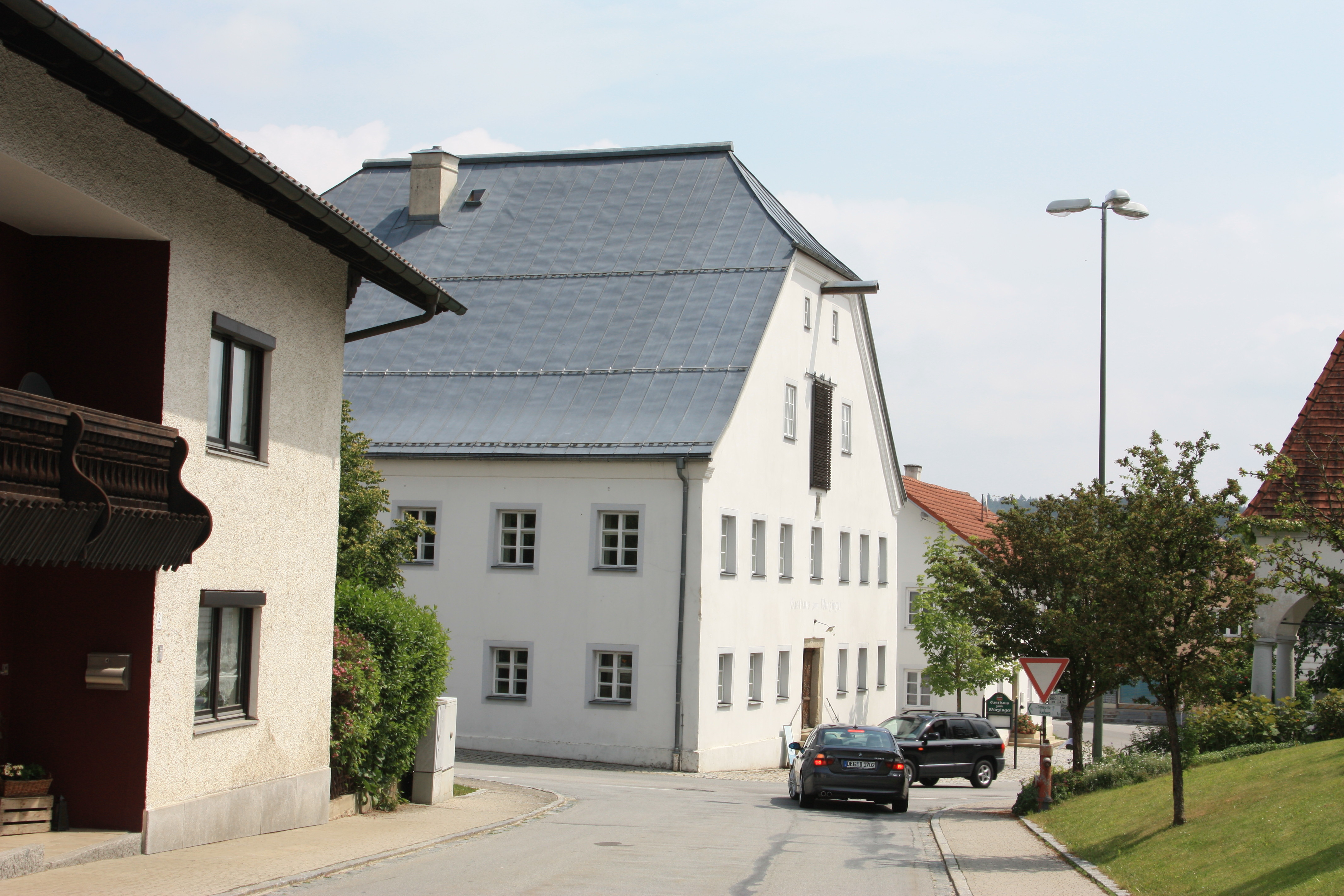 Gasthaus, 1818